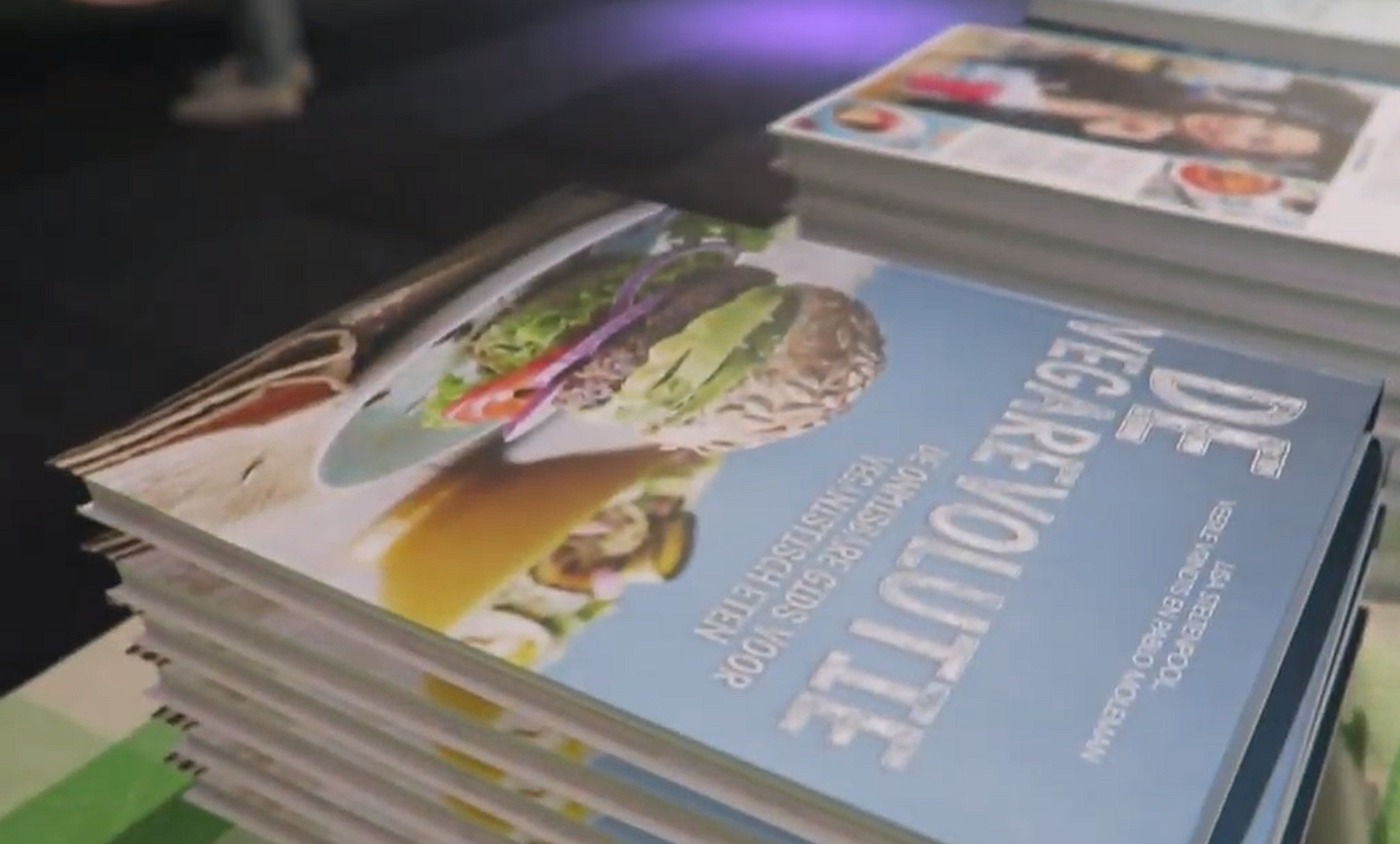 Boek De Vegarevolutie bij een stand op de Veggie Food Fair 2017 in Utrecht.